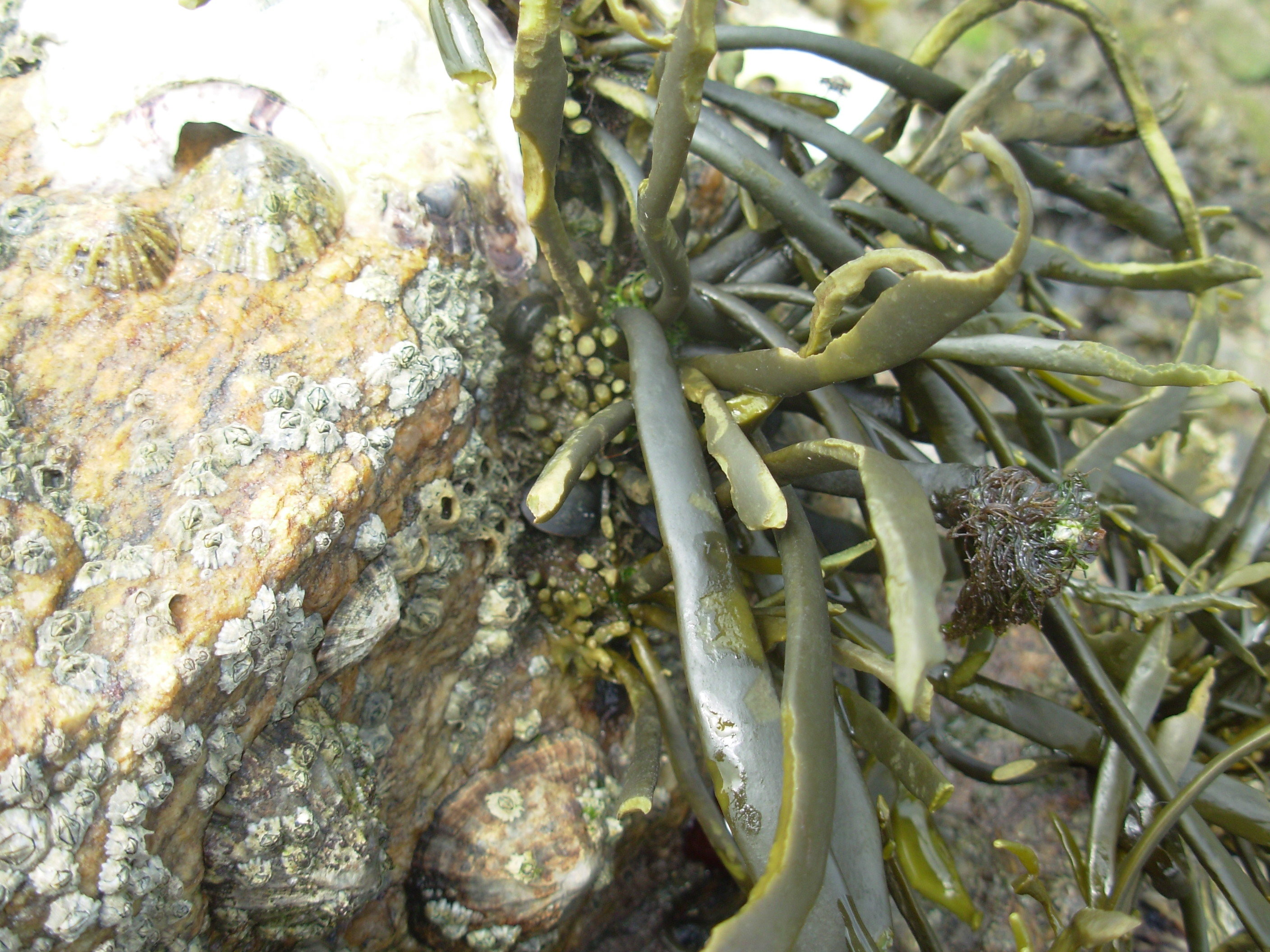 Touffe d'Ascophyllum broutée par des parcelles.